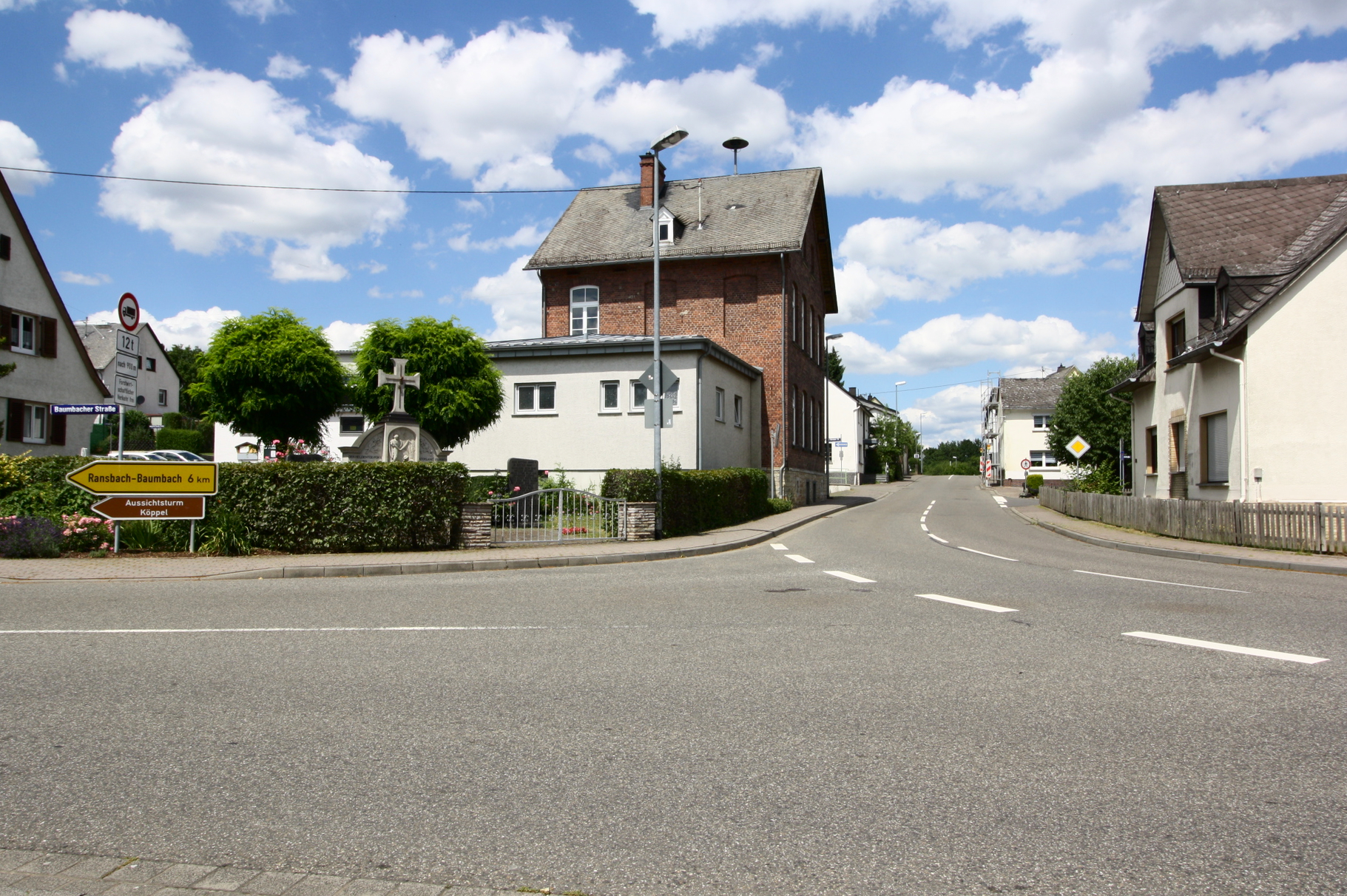 Elgendorf, Ortsteil von Montabaur, Westerwald, Rheinland-Pfalz, Deutschland